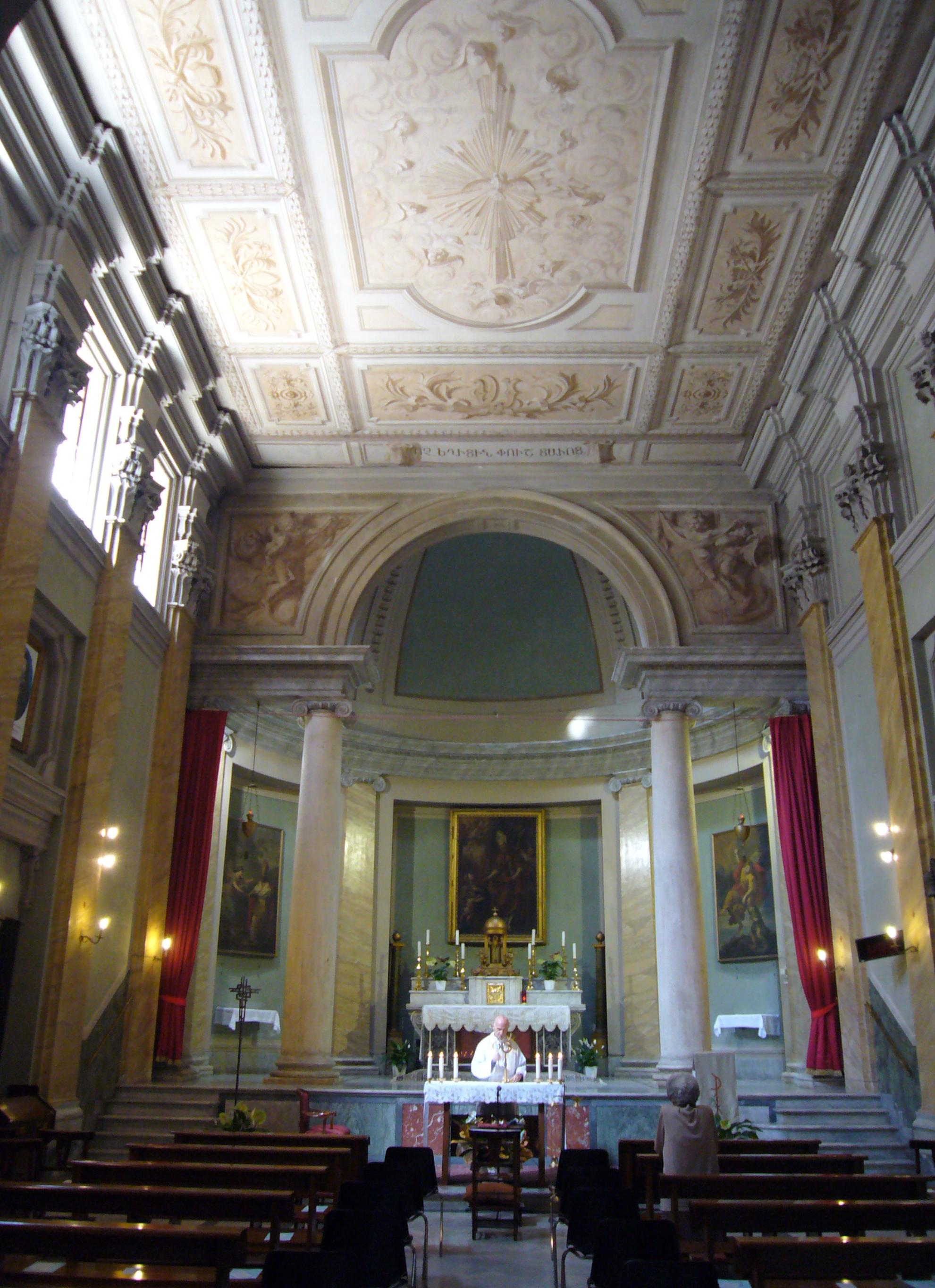 Roma, san Biagio degli Armeni (o della Pagnotta) in via Giulia